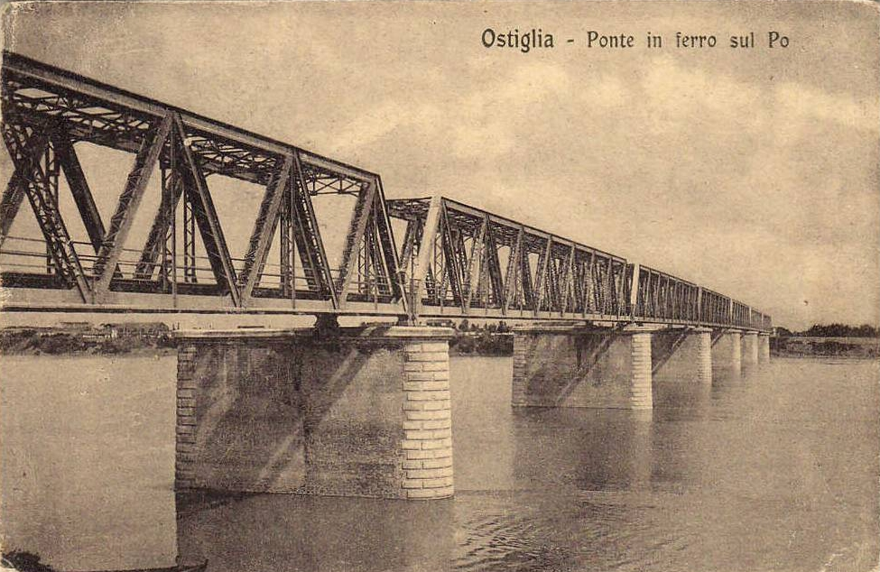 Ostiglia - Ponte in ferro sul Po (1918)